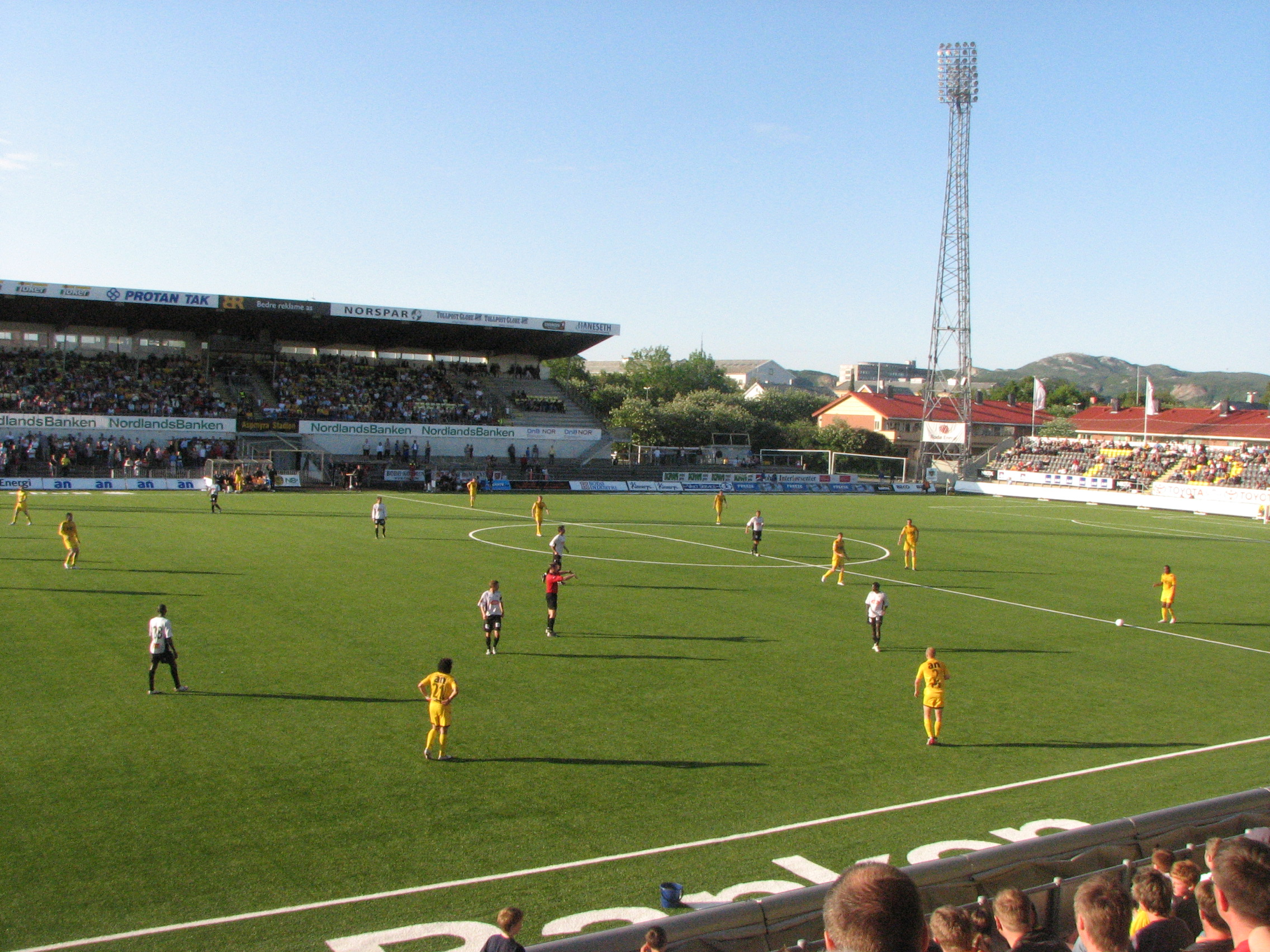 Aspmyra stadion, Bodø/Glimts stadion i Bodø. Kampen er B/G-Sogndal